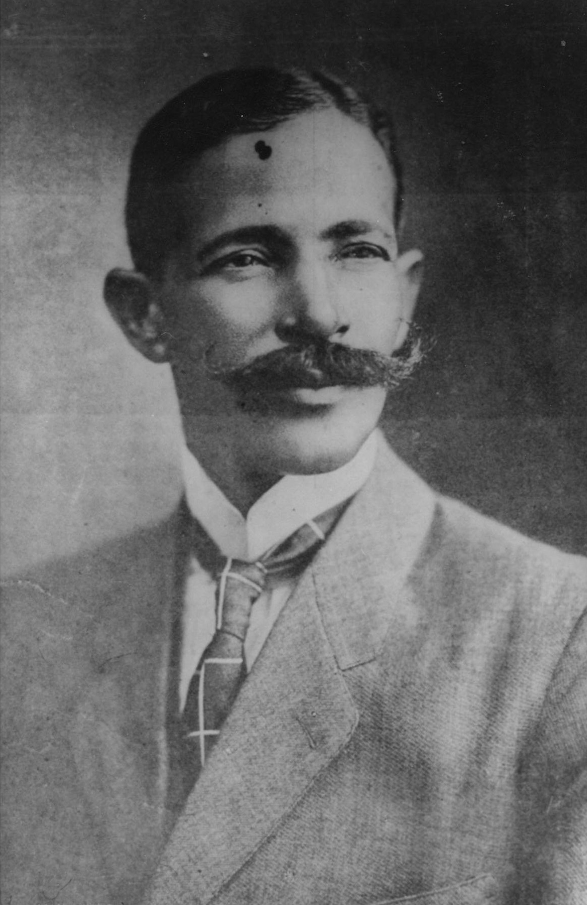 Retrato de Desiderio Arias, destacado militar dominicano.